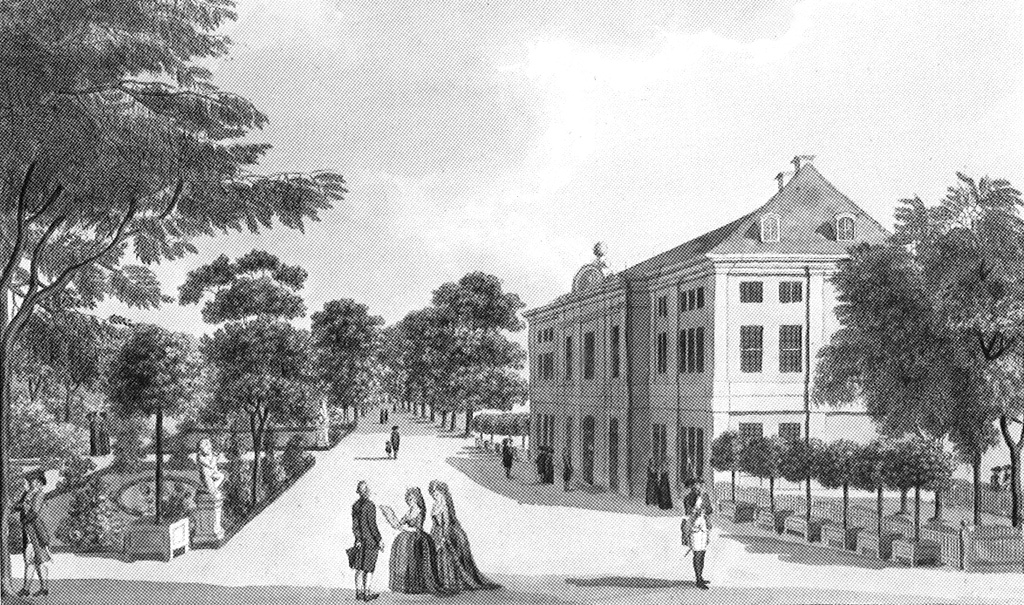 Schönhausen (1787, Schwarz)